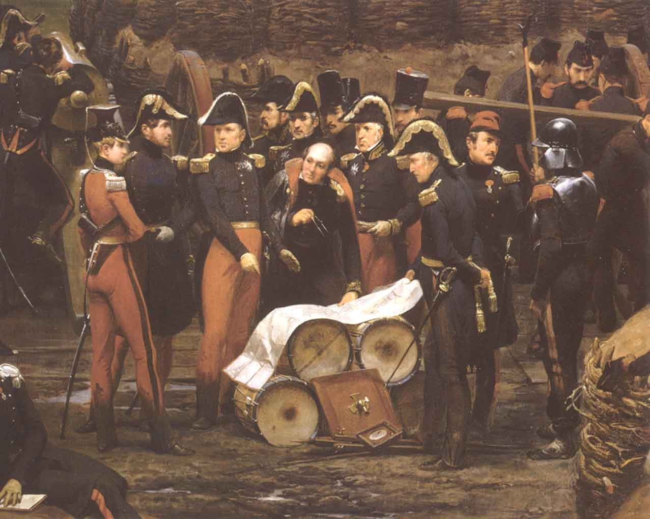 Le maréchal Gérard (à droite du duc d'Orléans) en compagnie du duc de Nemours (en rouge, à gauche) et du duc d'Orléans (barbu, à droite du duc de Nemours) au siège de la citadelle d'Anvers en 1832. Détail de la peinture "Siège de la citadelle d’Anvers, 22 décembre 1832" d'Horace Vernet (1840)